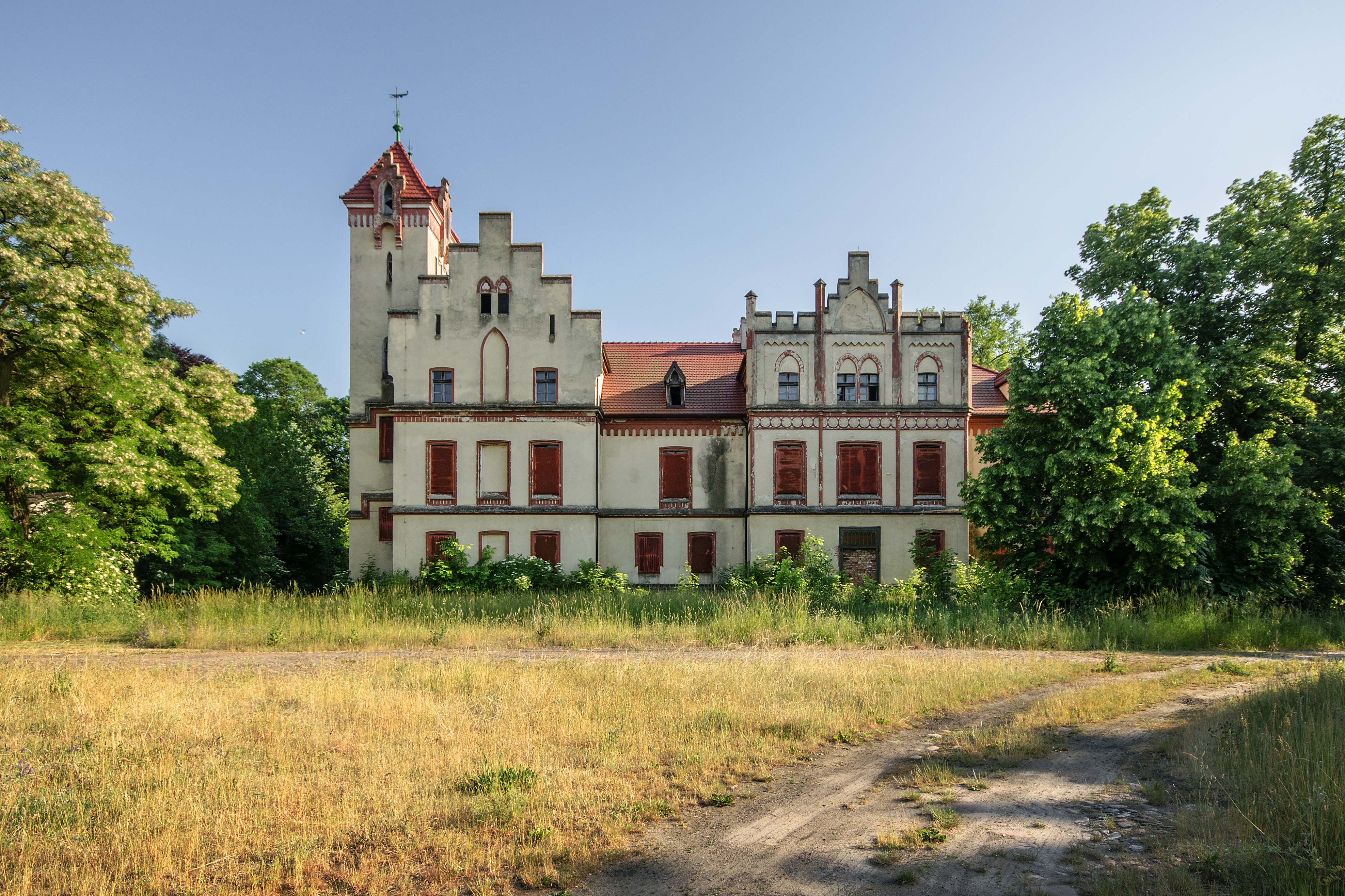 Kłoda Górowska, pałac, 3 ćw. XIX